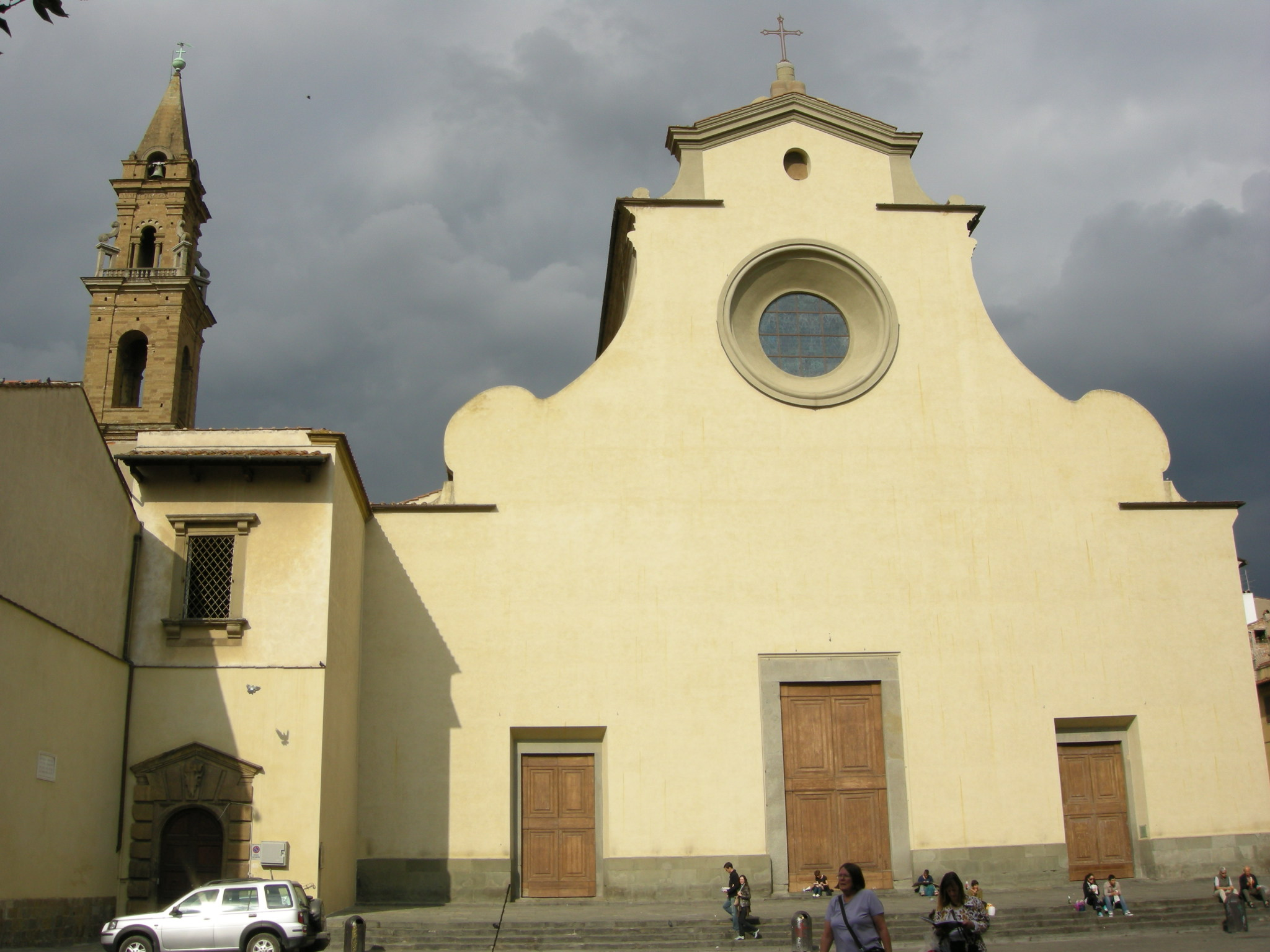 Facciata di santo spirito